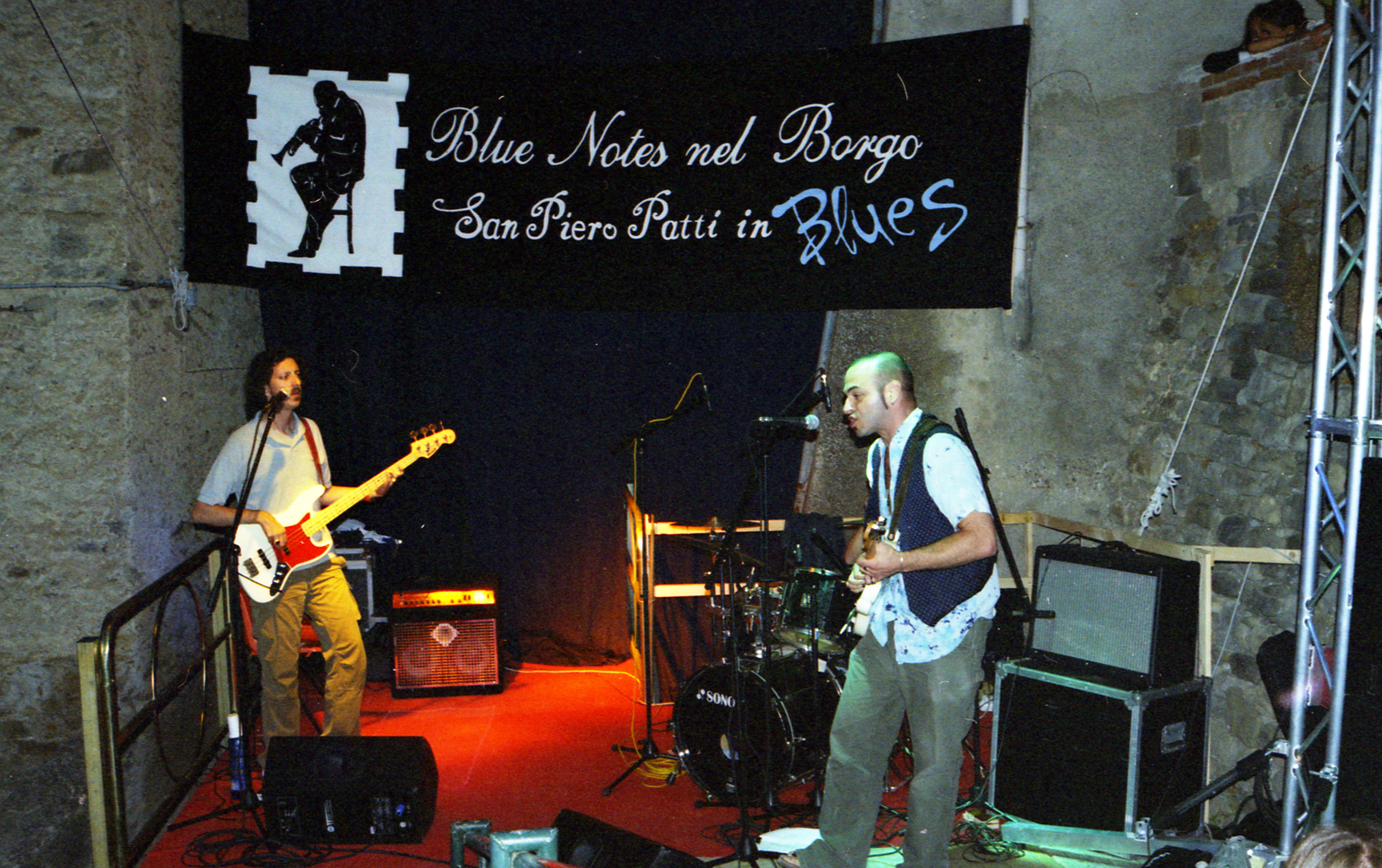 Manifestazione Blues a San Piero Patti 2008